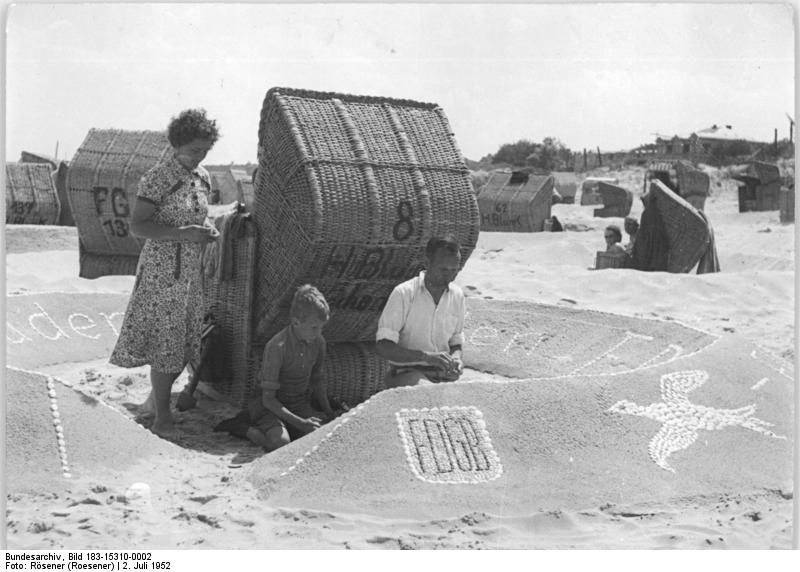 Zentralbild-Rösener Leu-Fg. 2.7.1952 Ferienfreuden am Ostseestrand - Ahlbeck 1952 - Recht auf Arbeit - Recht auf Erholung. Die Werktätigen der DDR schöpfen in ihrem Urlaub neue Kräfte für die Erfüllung des Fünfjahrplanes und die Erhaltung des Friedens. In den herrlichen Ferienheimen des FDGB, die in den schönsten Gegenden, sei es an der Ostsee, in Sachsen oder im Thüringer Wald, liegen, können sie wohnen. Es wird dafür gesorgt, daß die Kollegen erholt und gestärkt an ihren Arbeitsplatz zurückkehren. UBz: Strandburg - Wettbewerb - Für die am besten ausgeschmückten Strandburgen hat die Ahlbecker Kurverwaltung wertvolle Preise ausgesetzt.